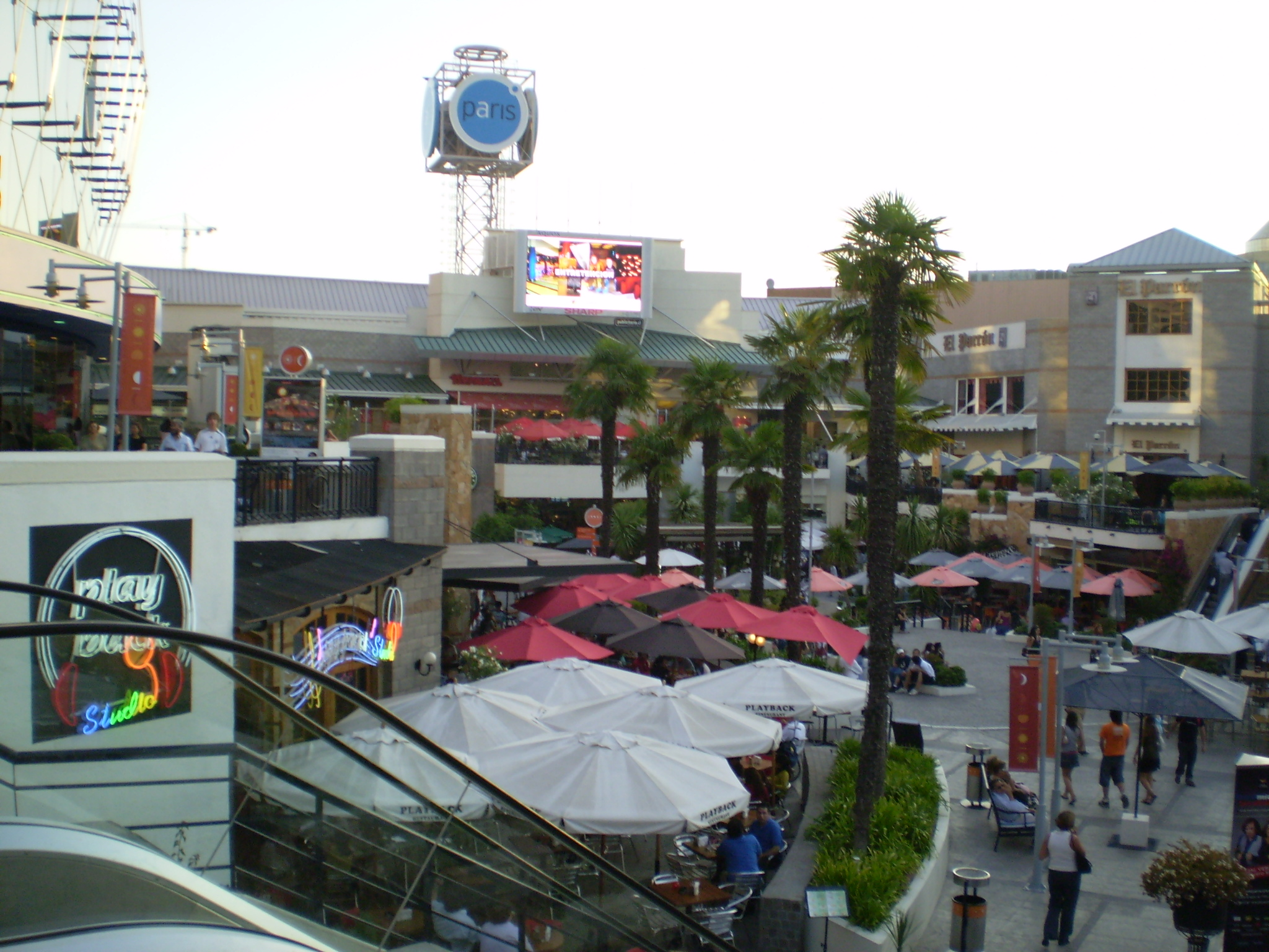 Parque Arauco, Boulevard del Parque (Foto tomada desde el segundo nivel)